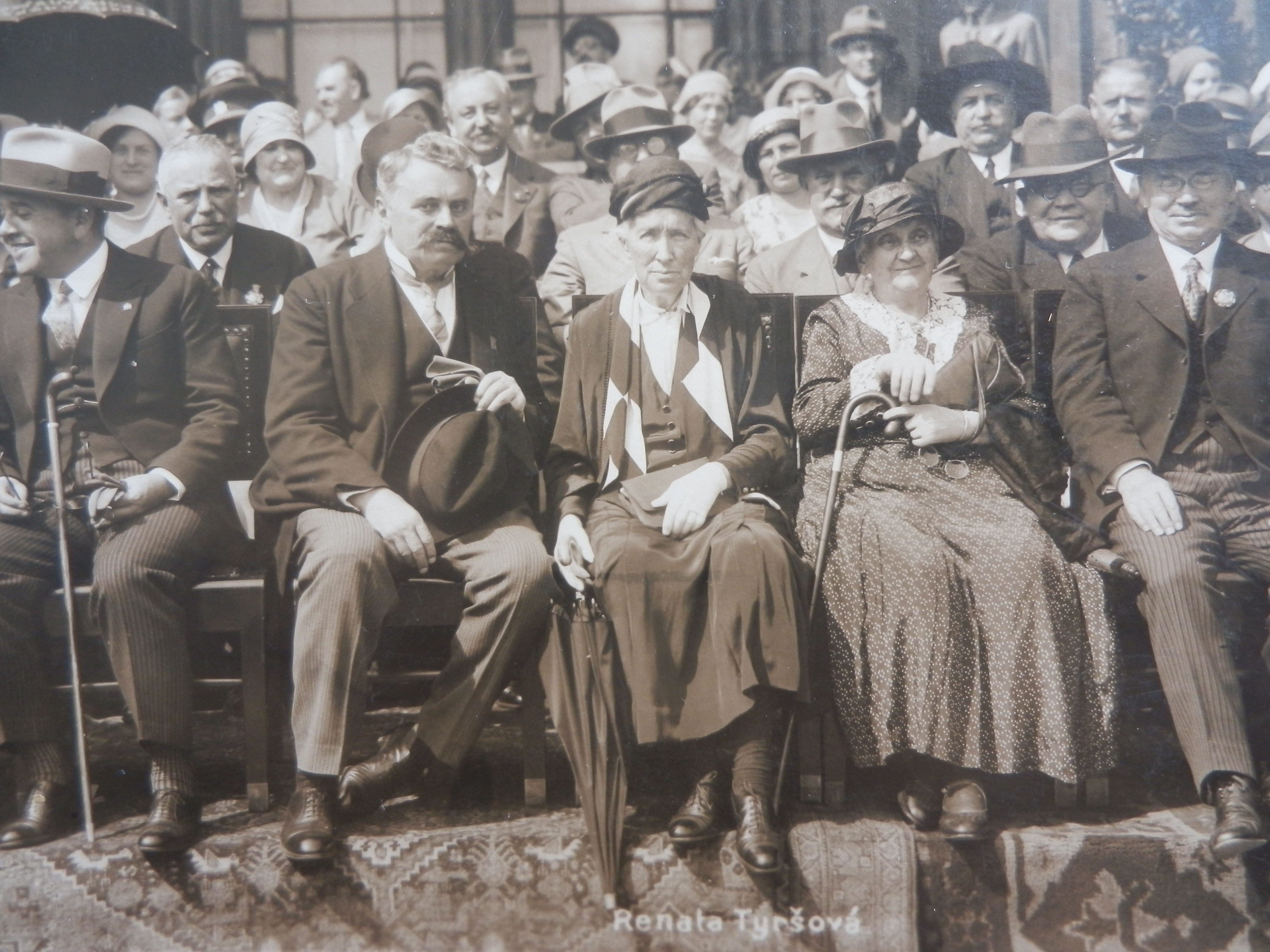 Renata Tyršová, Sokolský slet 1932